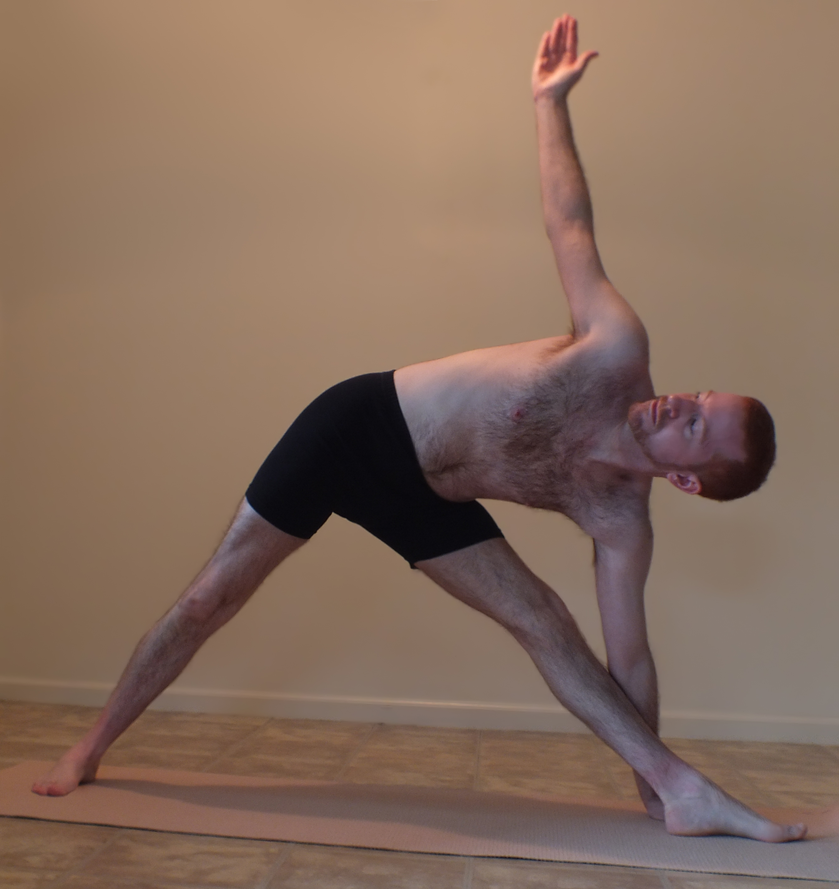 Triangle pose (trikonasana).